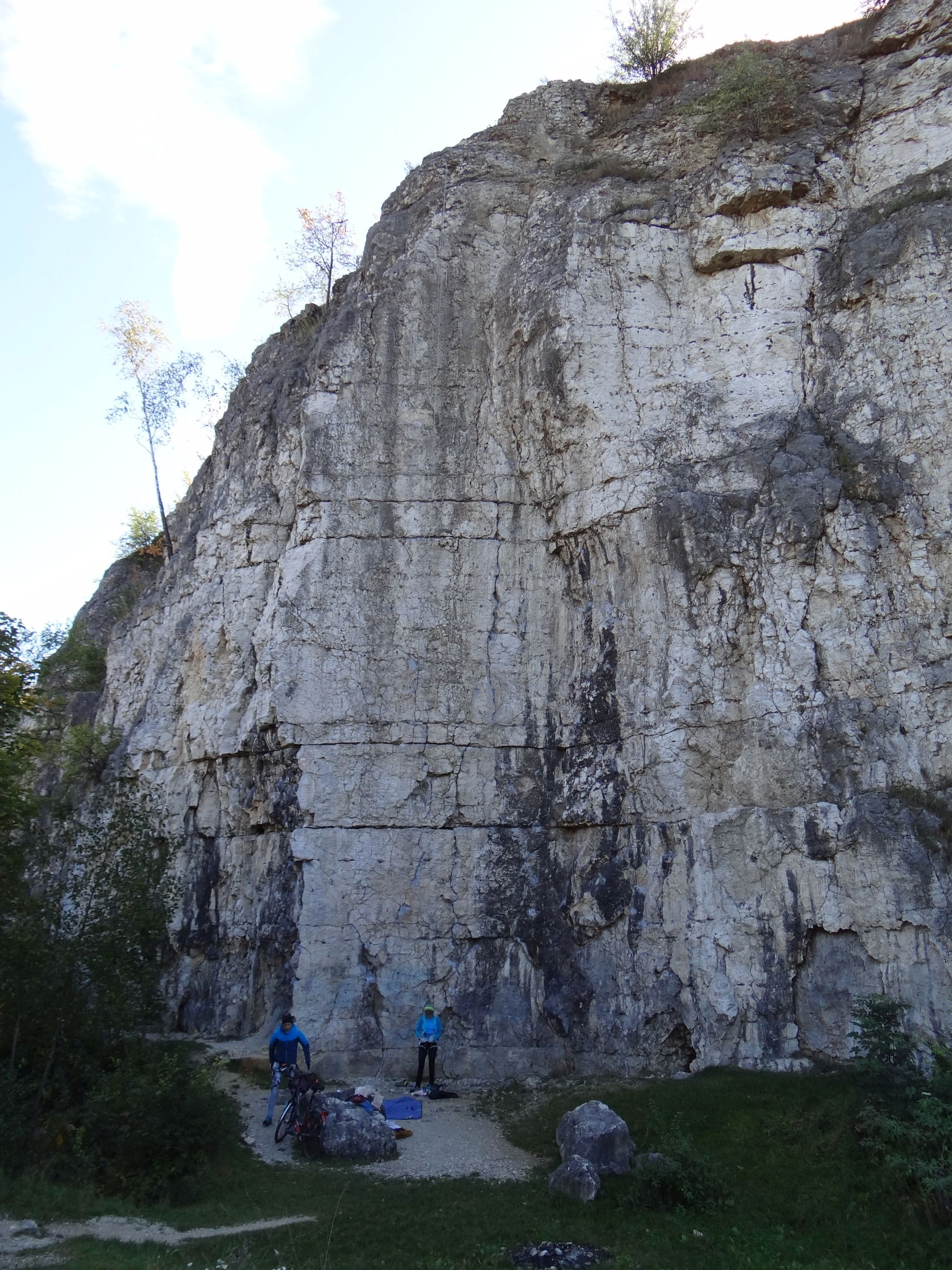 Baba Jaga na Zakrzówku w Krakowie